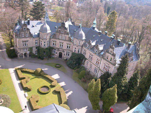 Niedersächsisches Landesarchiv -Staatsarchiv Bückeburg- im Ostflügel des Schlosses in Bückeburg